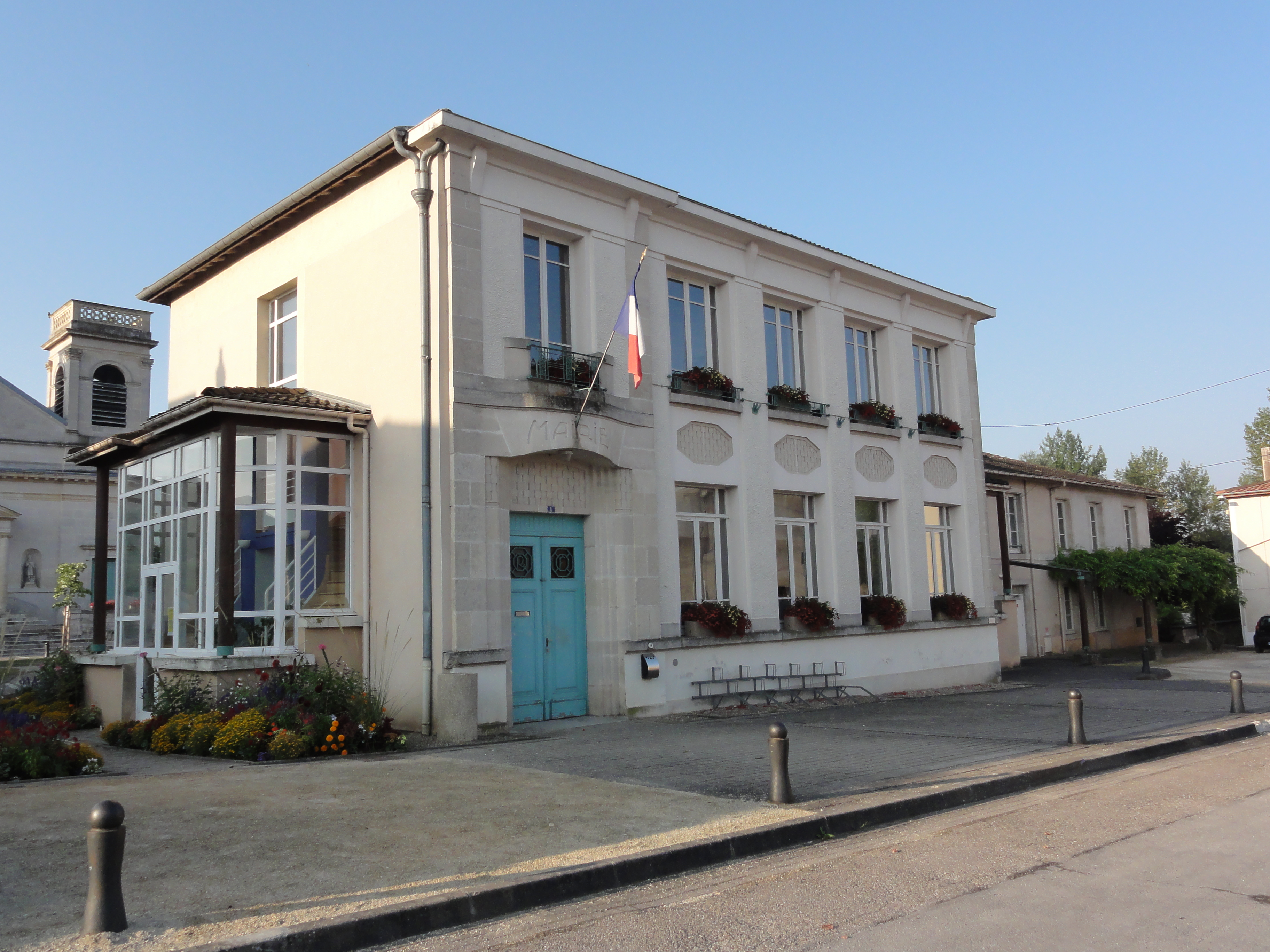 Dieue-sur-Meuse (Meuse) mairie